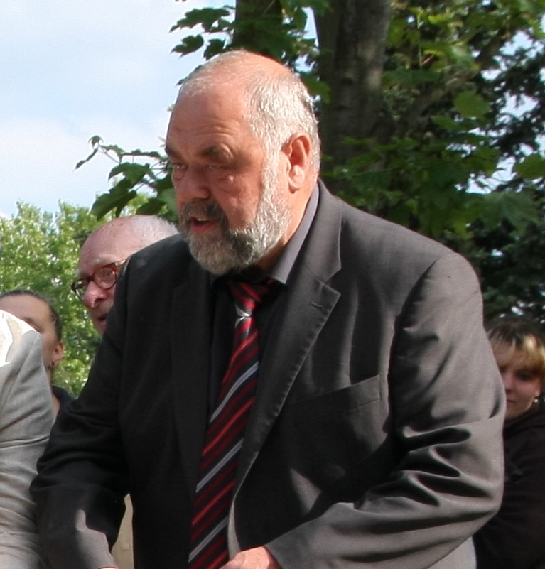 Freitaler Oberbürgermeister Klaus Mättig bei der Eröffnung des Mehrgenerationenparks Zauckerode